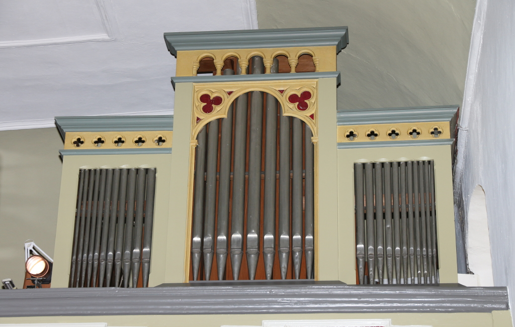 Horn-Orgel in Sauerthal (1903) - Prospektansicht (Veröffentlichungsgenehmigung am 15.5.2014 durch V. Rohrbach/Lorch erteilt)